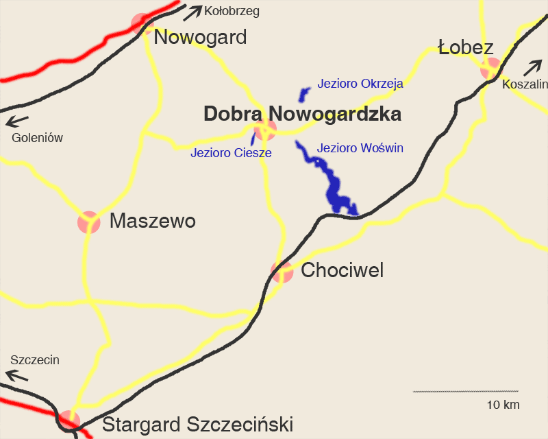 Location of Dobra Nowogardzka, Poland.